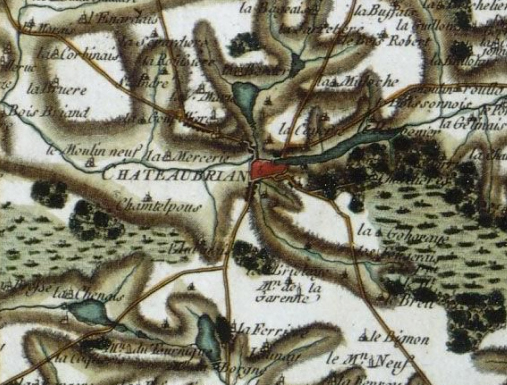 Partie de la carte générale de la France [Rennes]. N°129. centrée sur la ville de Châteaubriant.